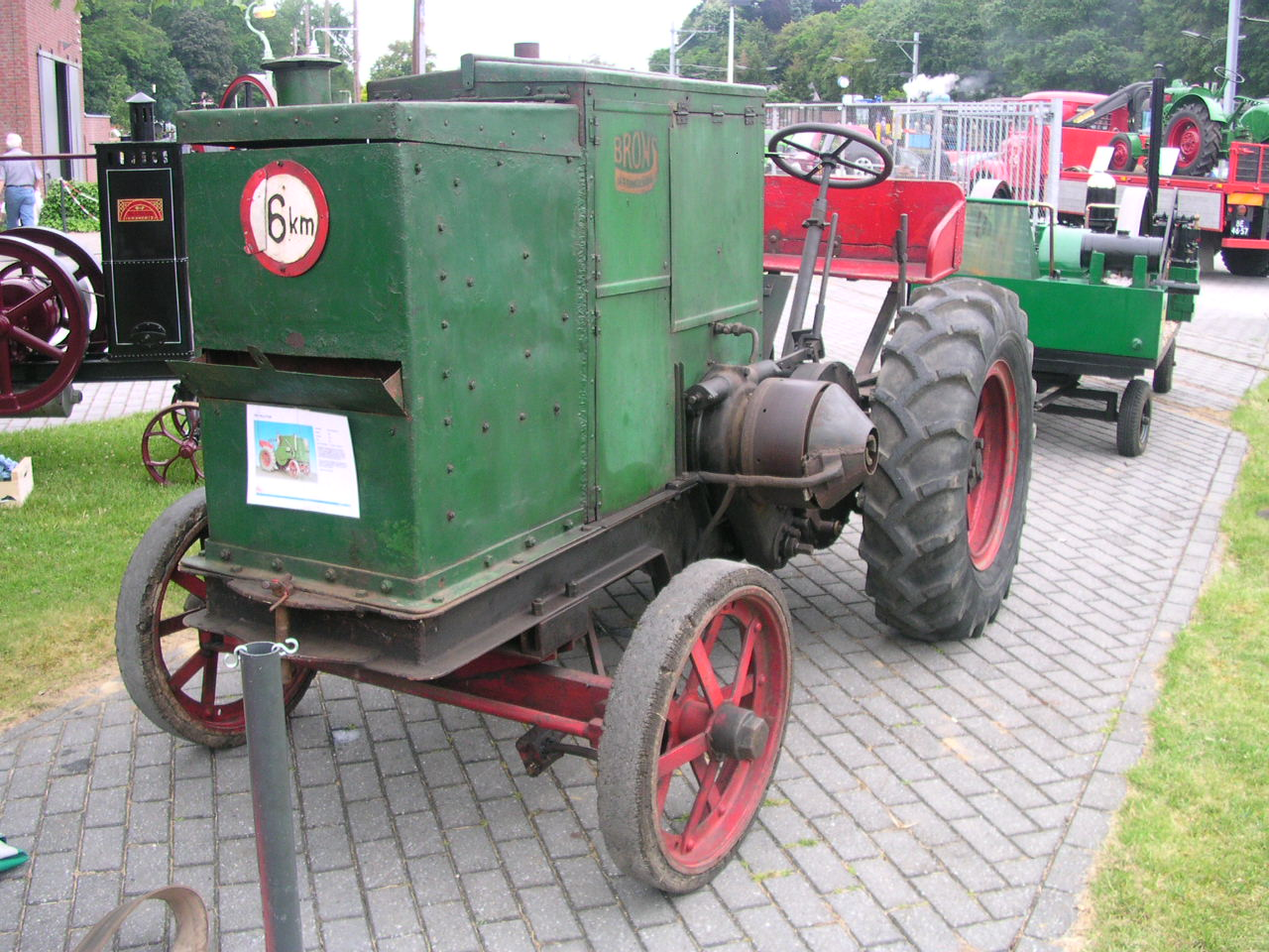 Kerkrade, Industrion, Maschinenfest 2004. Motor von Brons, Appingedamm